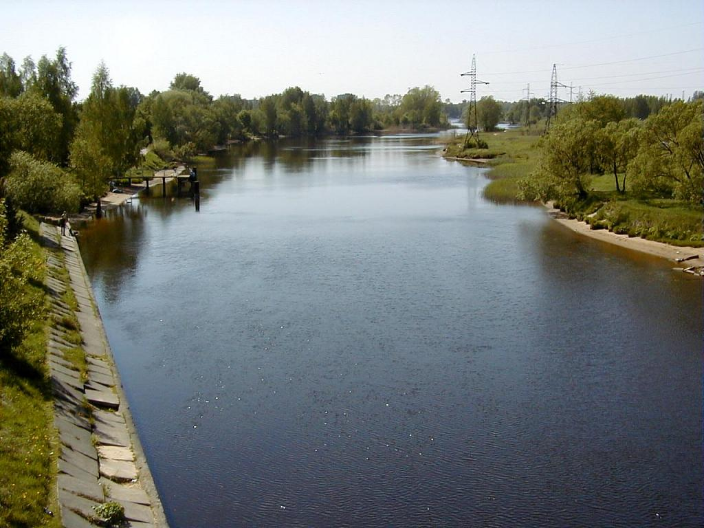 Juglas kanāls pie Bukultiem 2002-05-12